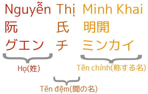 ベトナム人の名前Tiếng Việt: Tên gọi người Việt Nam